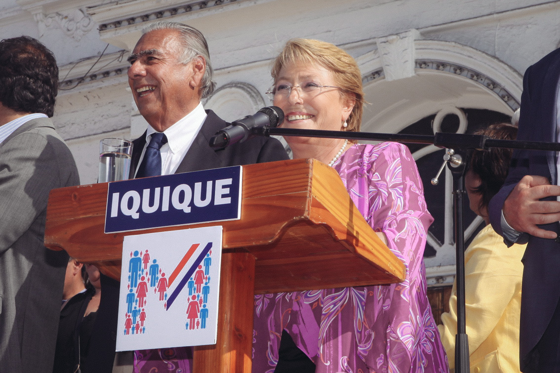 Iquique 09/10/2013